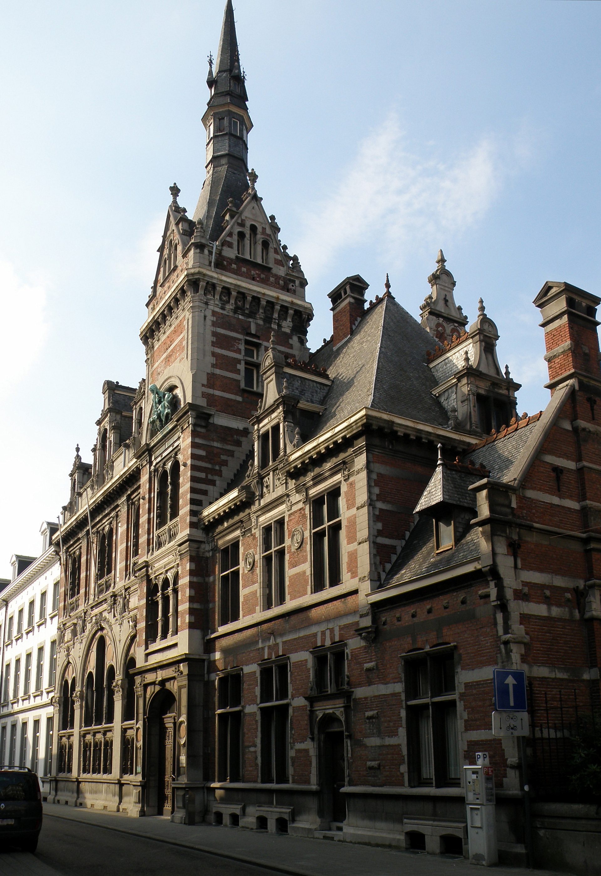 Hasselt (prov. Limburg, België). Provincieraadsgebouw, Lombaardstraat nr. 19. Vierde kwart 19de eeuw.